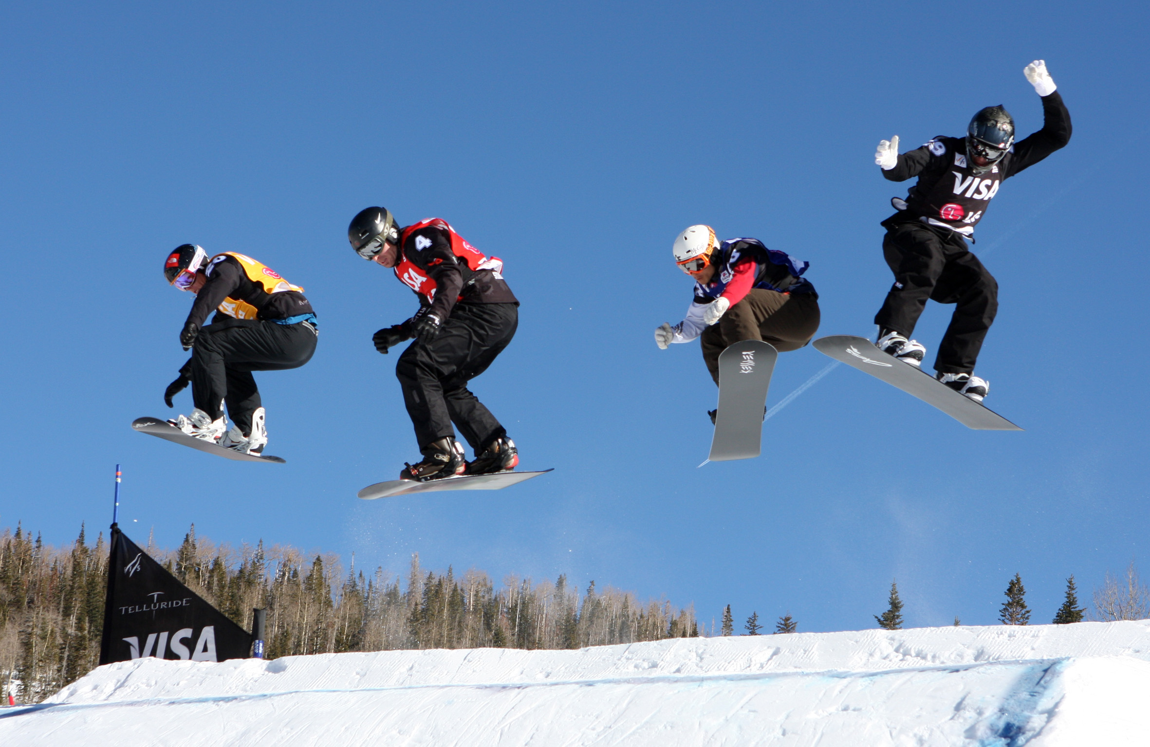 Telluride_SBX_Eighth_Final_Men_Damon_Hayler_AUS_Tom_Velisek_CAN_Graham_Watanabe_USA, J. J. Tomlinson USA